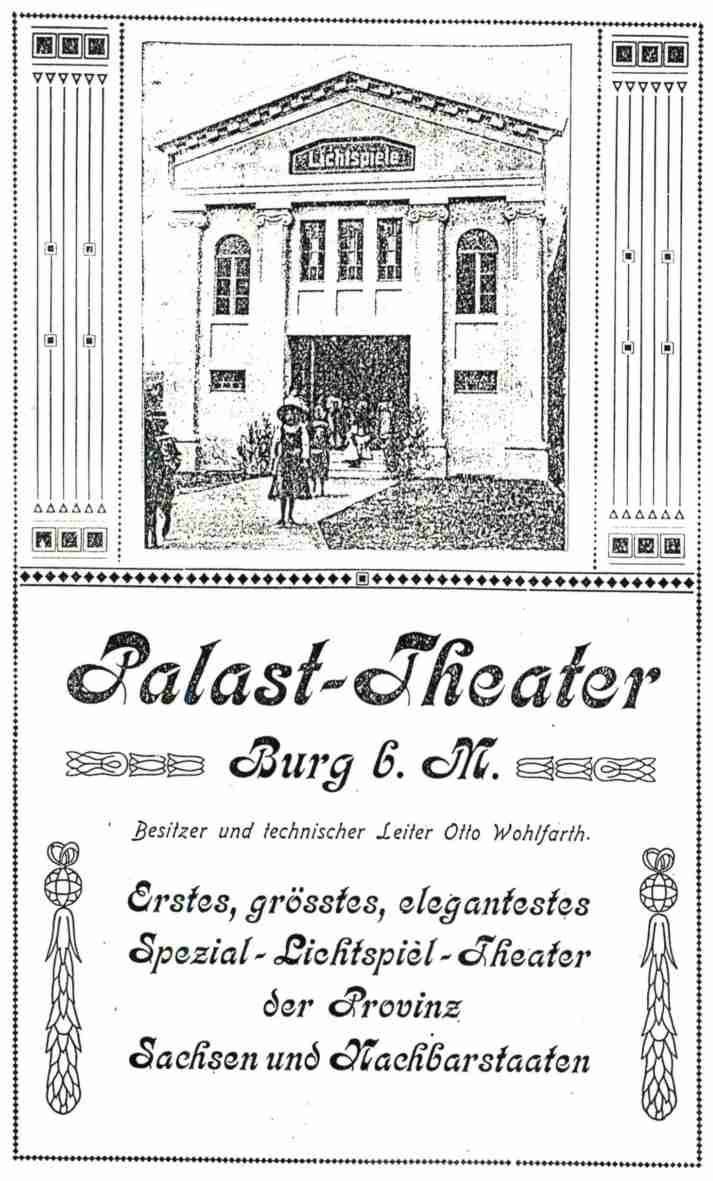 Anzeige des Kinos Palast-Theater (heute Burg Theater) in Burg bei Magdeburg, 1911?